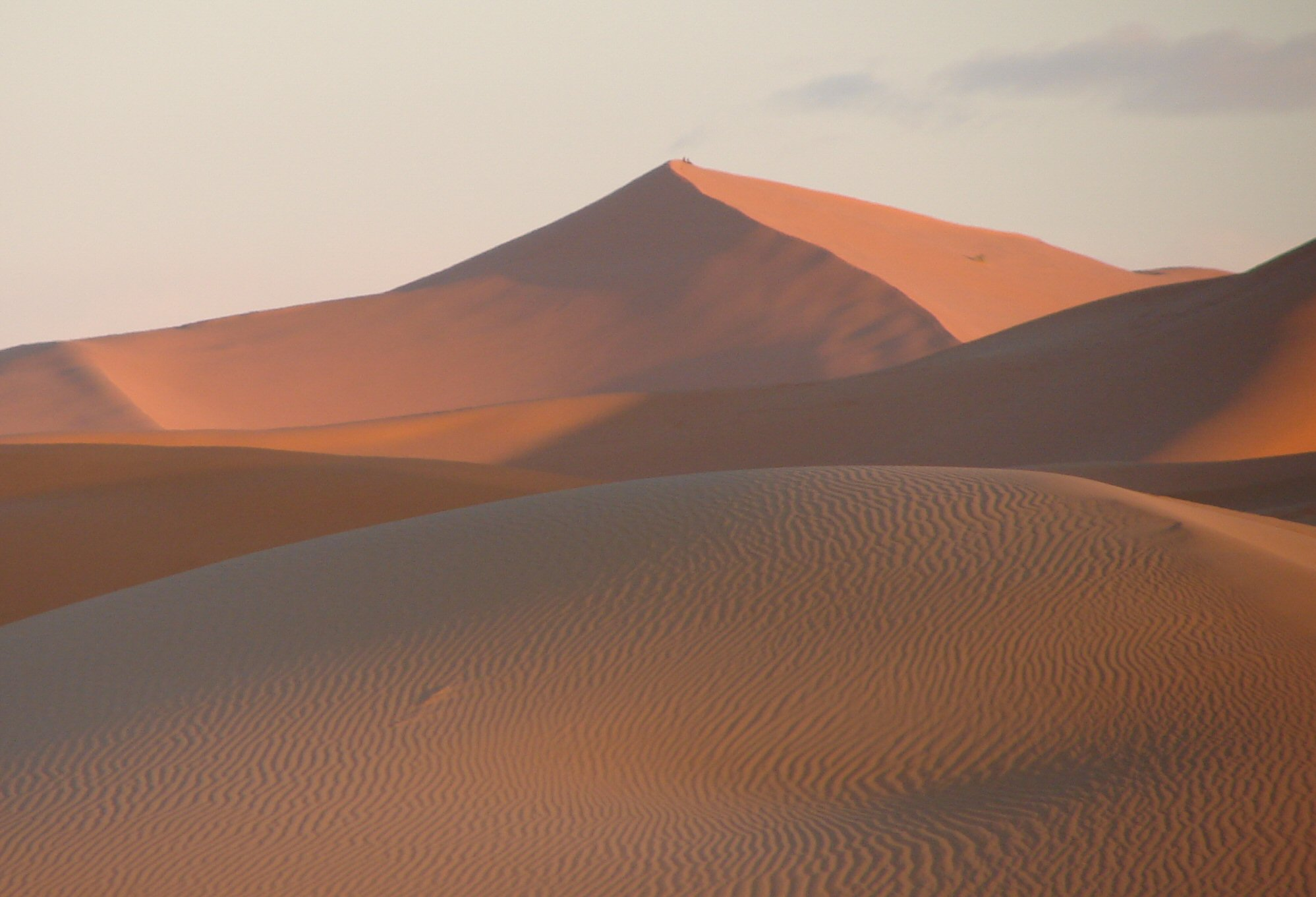 Erg Chebbi #2